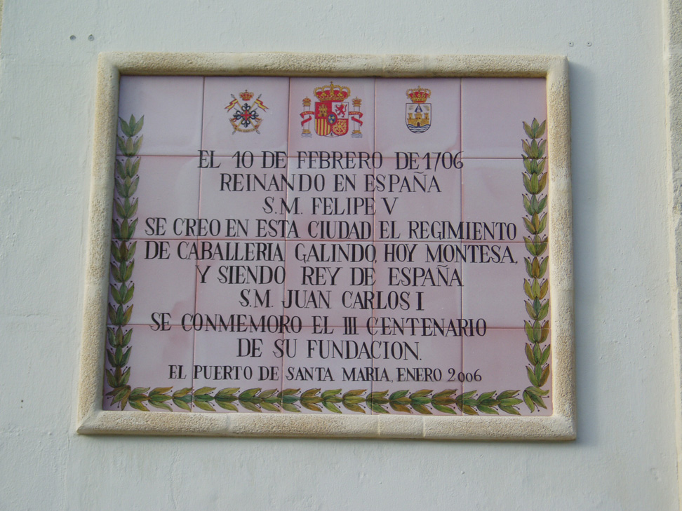 Placa del actual Teatro municipal de El Puerto de Santa María, España, antiguo Regimiento de caballería.